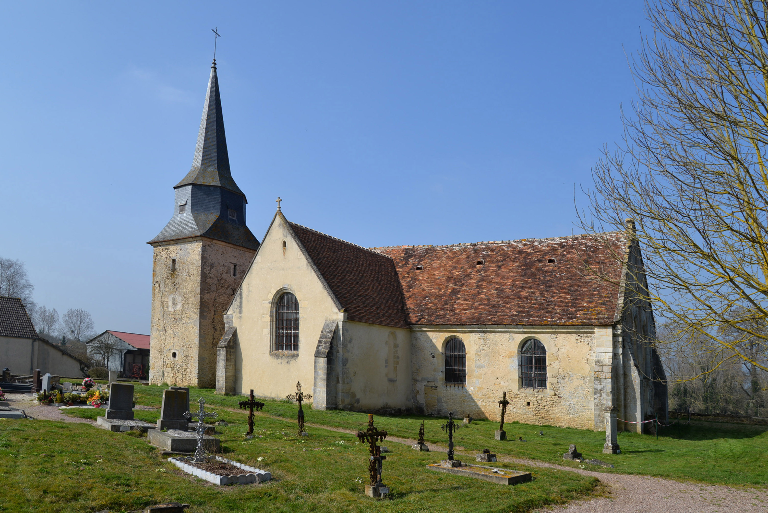 Église Saint-Gervais et Saint-Protais de Cuy, commune d'Occagnes (Orne)